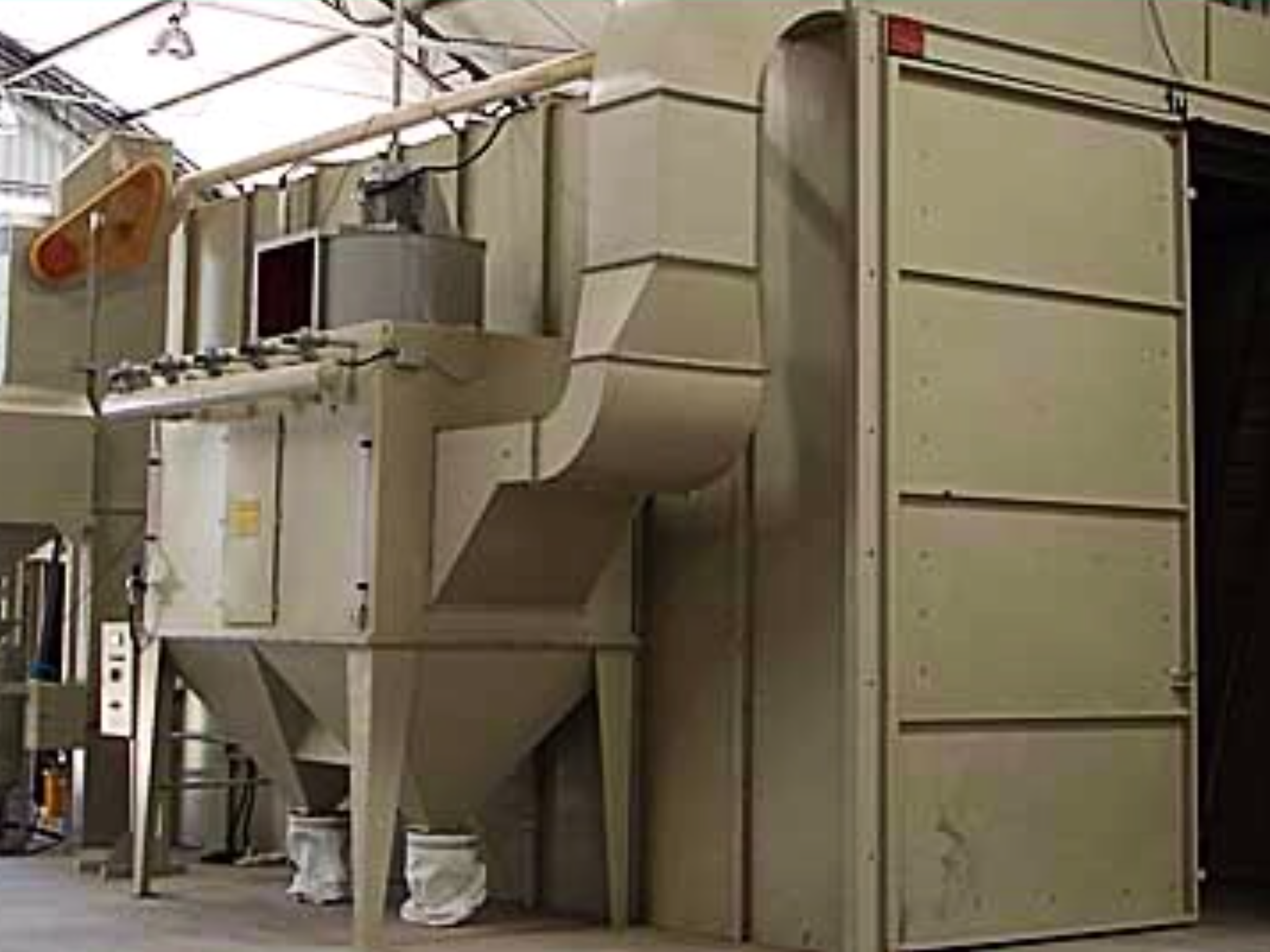 Coletor de Pó para a Cabine de Jateamento - Dimensionado para retirada do particulado gerado pelo processo de jateamento, através de ventiladores industriais modelo “Limit Load Classe II” movidos por motores de alto rendimento. A combinação de defletores para admissão e saída de ar garante excelente visibilidade operacional, bem como eliminam por sua forma construtiva o desperdício de abrasivo. O coletor de pó possuirá filtros de cartuchos com elementos em Celulose.